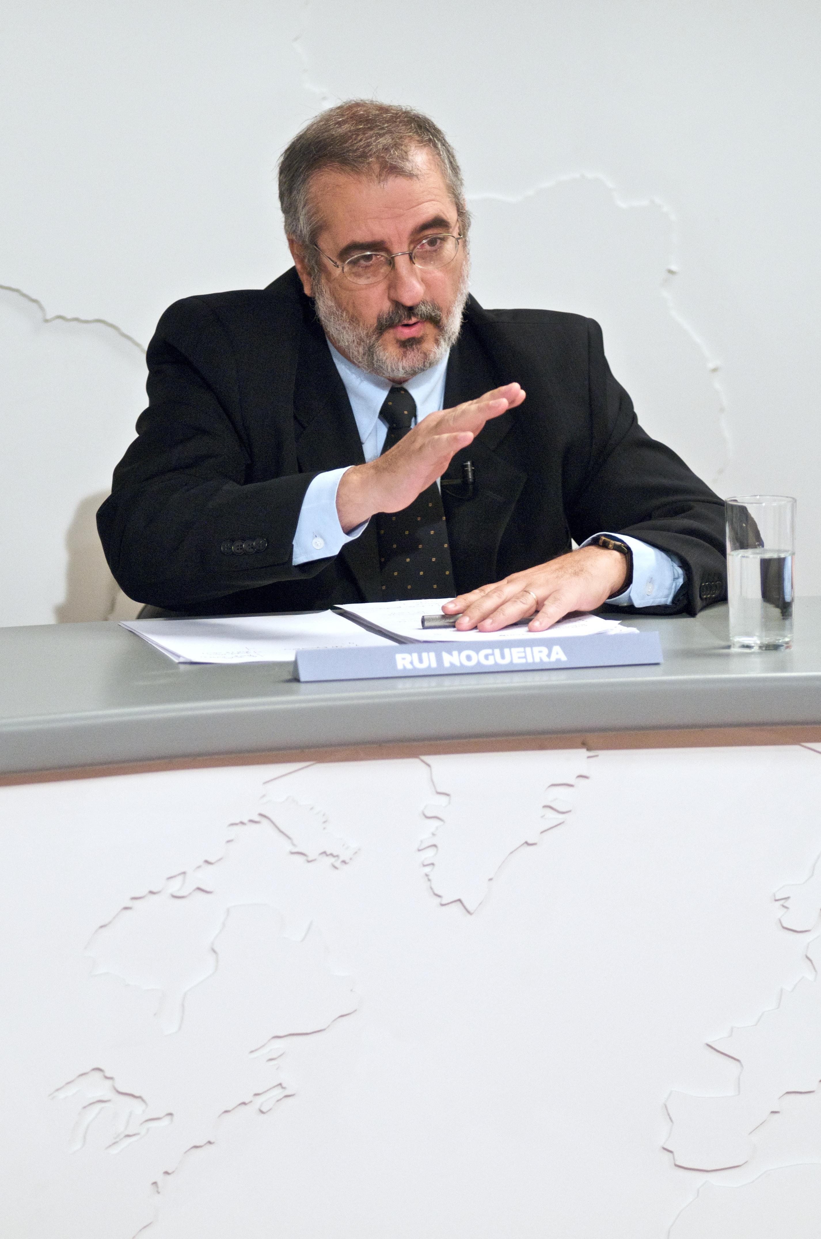 Rui Nogueira in Roda Viva, on the Brazilian public channel TV Cultura.